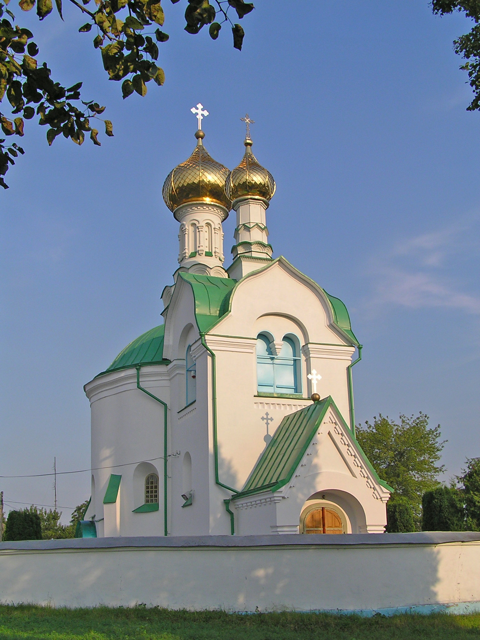 Василівська церква, вул. Князя Всеволода,28, м.Володимир-Волинський